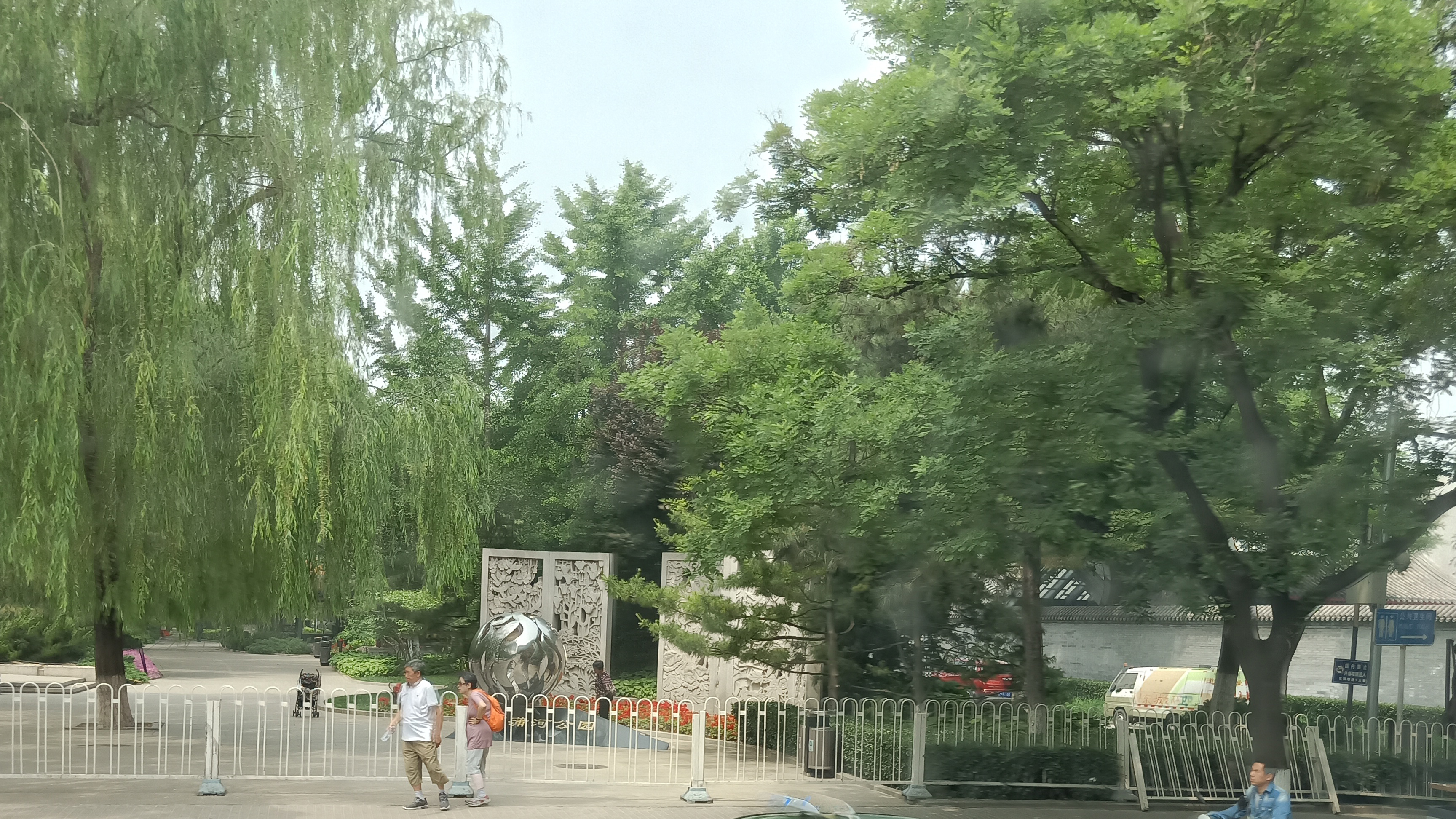 粵語: 菖蒲河公园东门